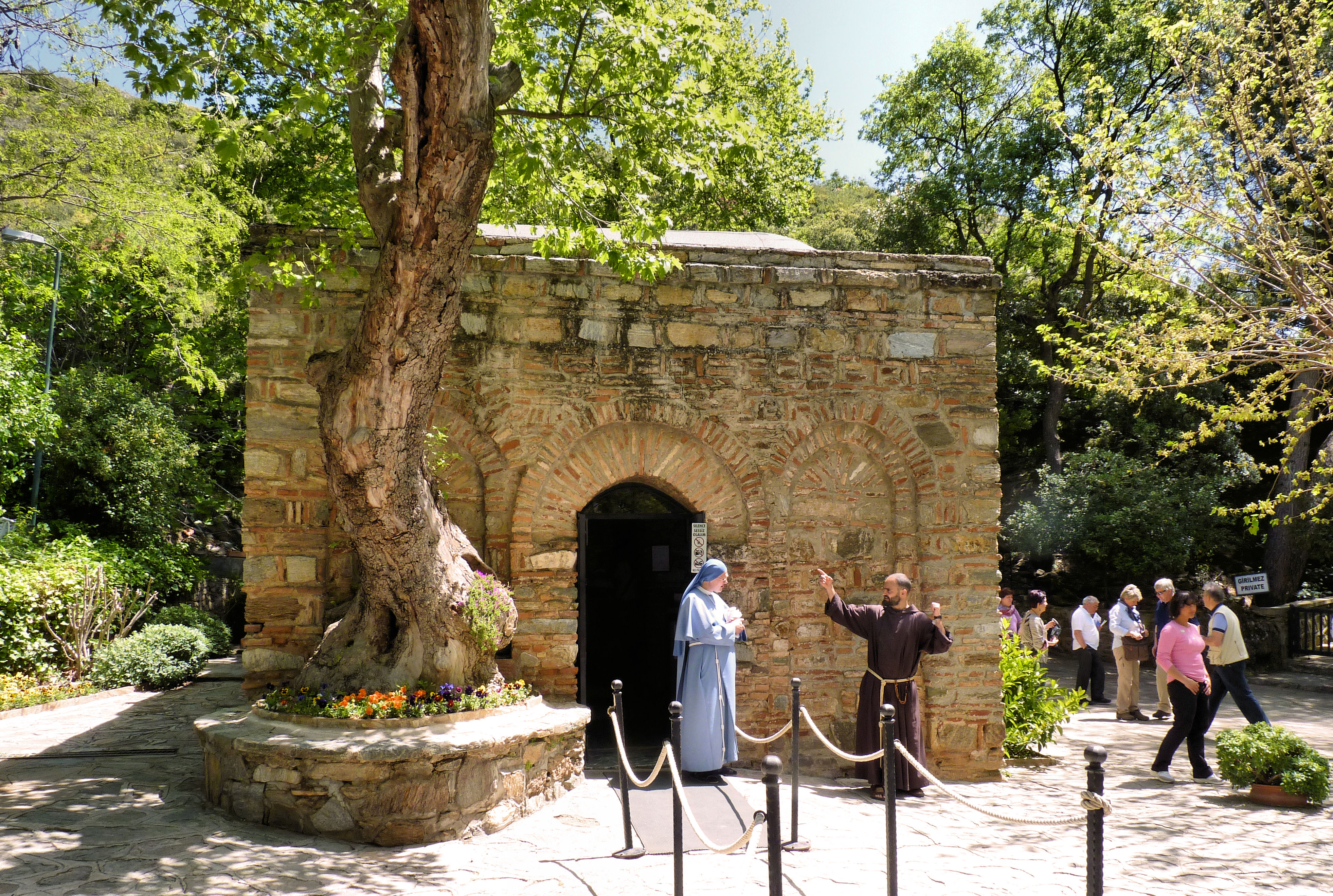 Efeso - La casa di Maria